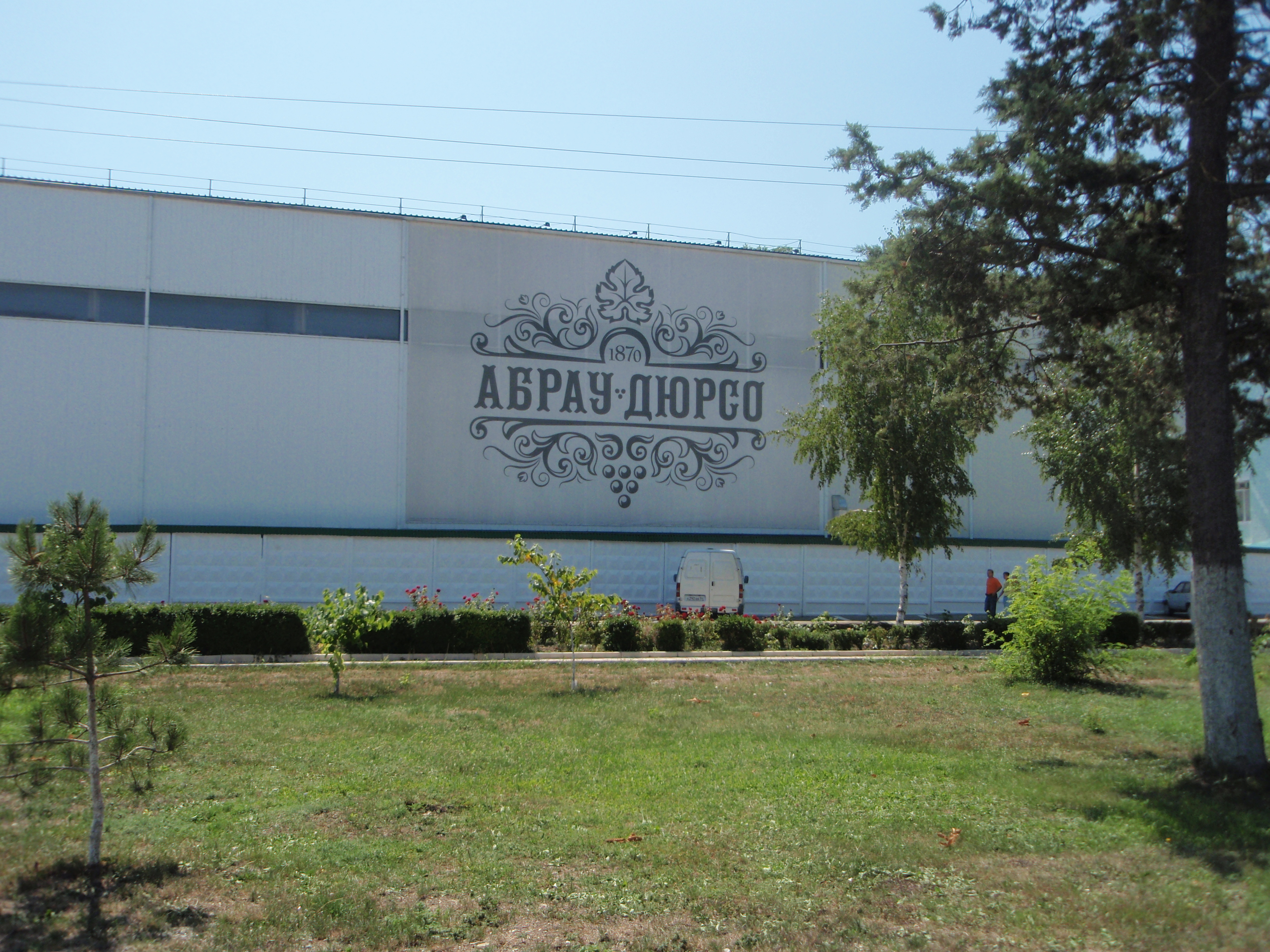 Винный завод «Абрау-Дюрсо» (Краснодарский край)